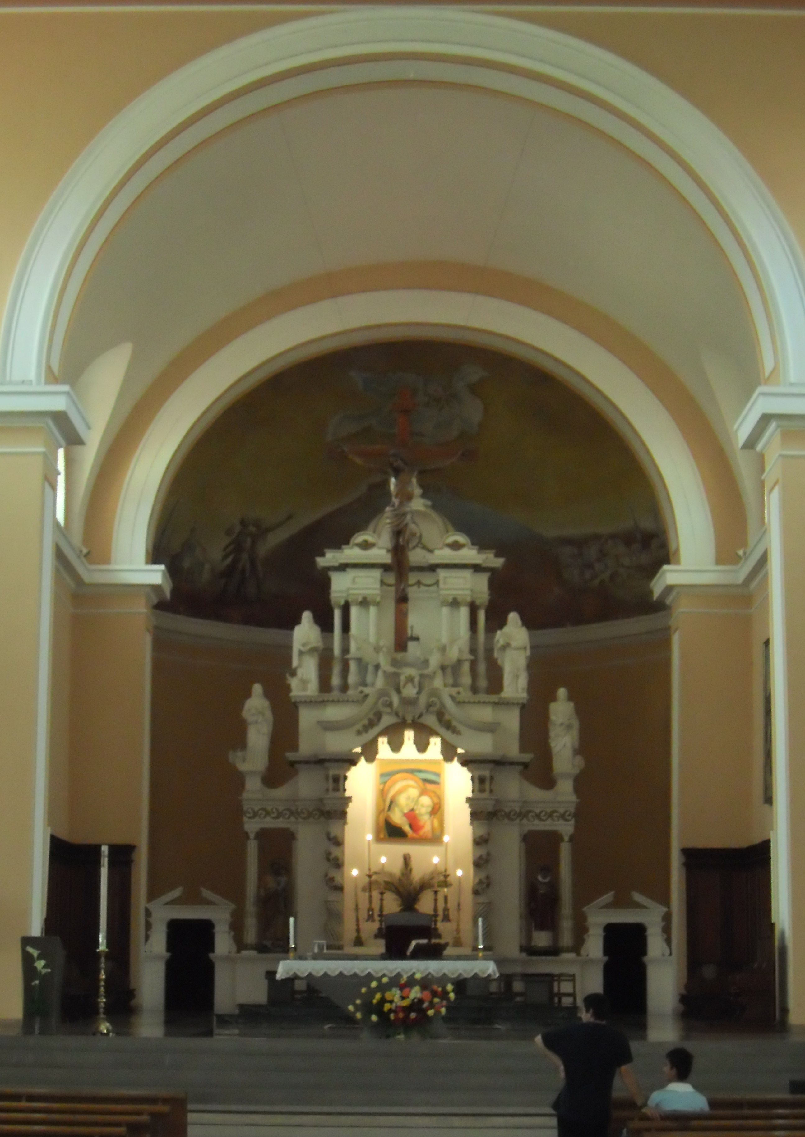 Kathedrale von Shkodra